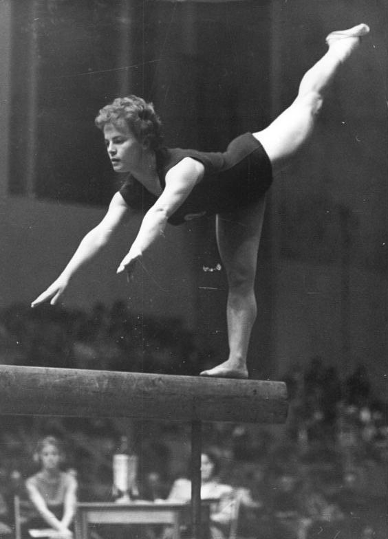 Renate Schneider Zentralbild Zastrow 13.1.1960 Spitzensportlerinnen der DDR im Turnen UBz: Renate Schneider (SC Dynamo Berlin).